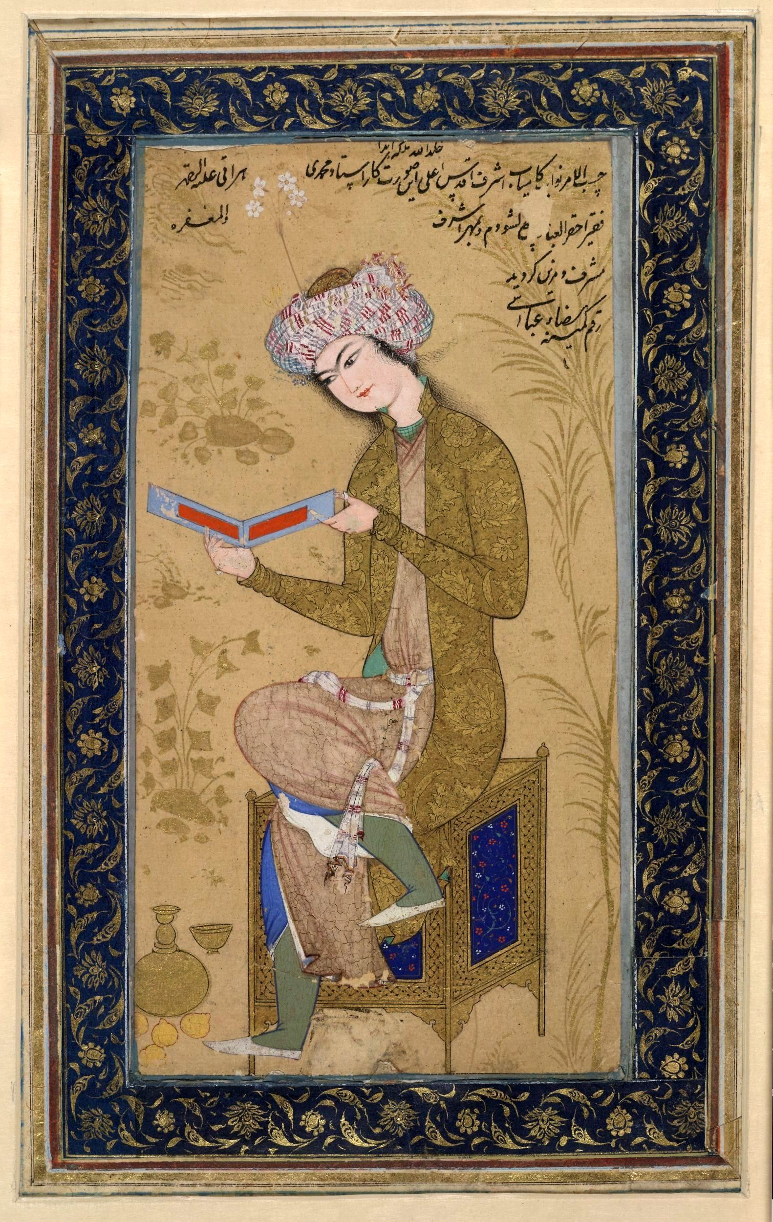 Riza-yi-AbbasiСидящий_юноша.(подписан_Риза)_ок.1625 British Museum ME 1920.0917.0298.3